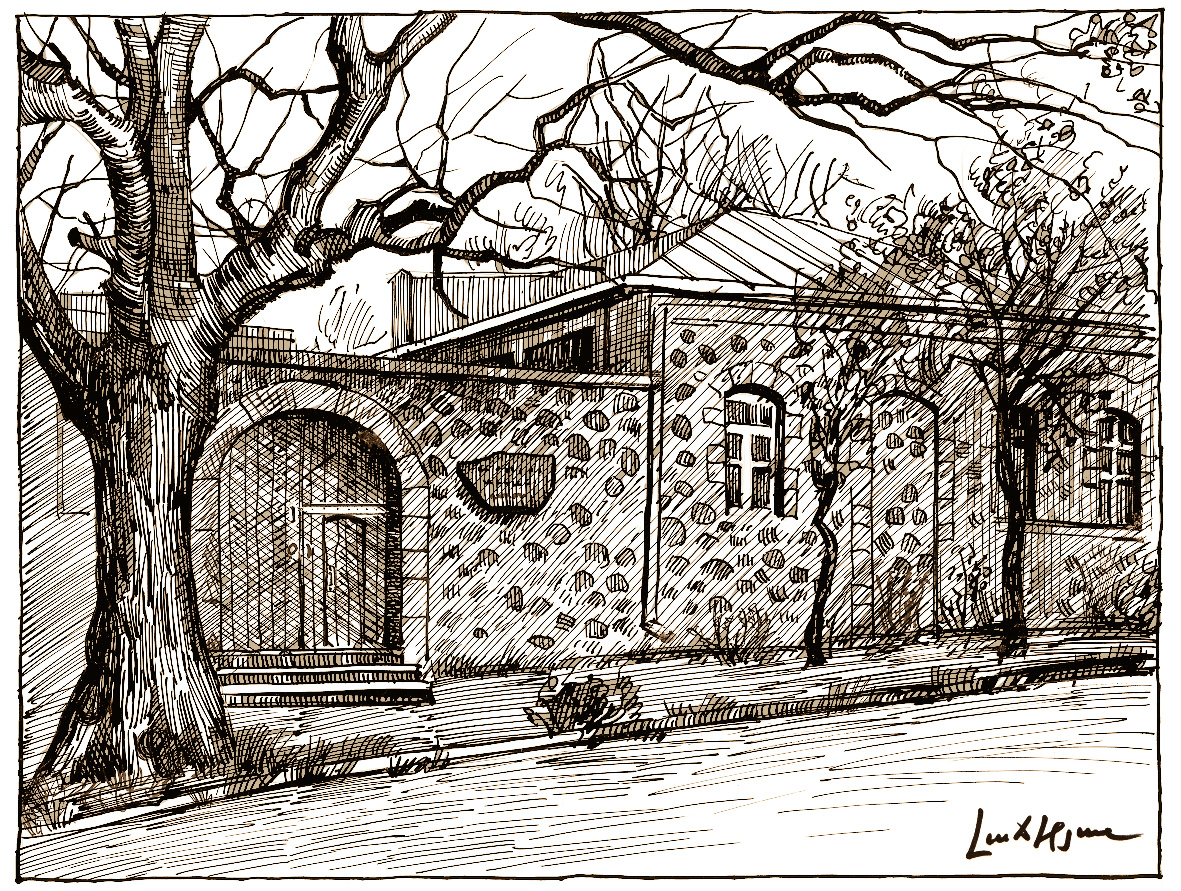 Լևոն Լաճիկյան, Գորիս, Ակսել Բակունցի թանգարան